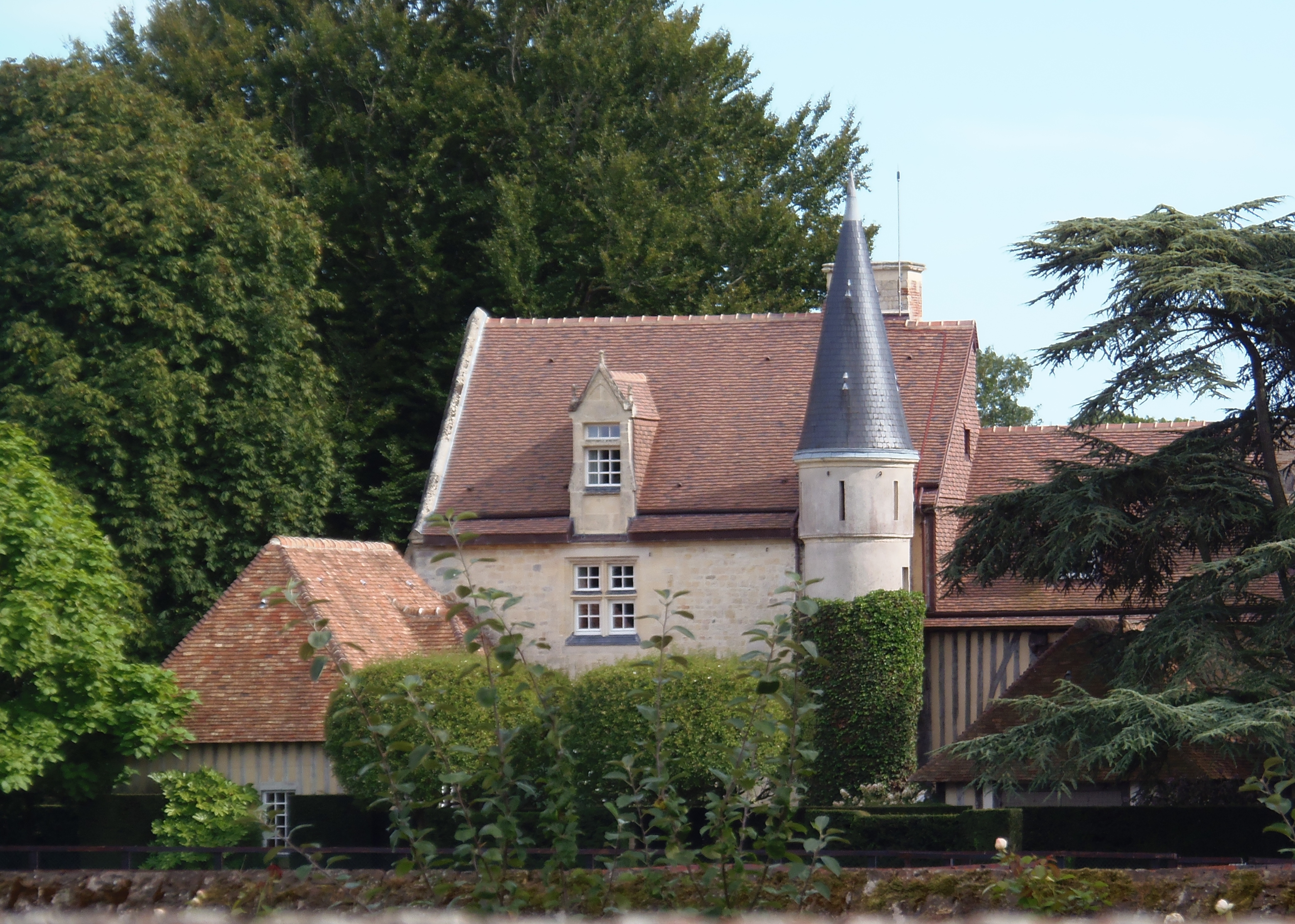 Touques (Normandie, France). Le manoir de Méautry.